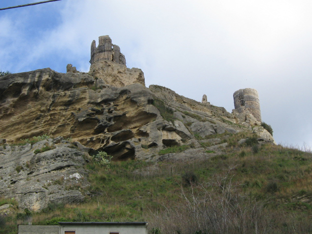 Cleto, vista dal bsso del Castello Normanno.